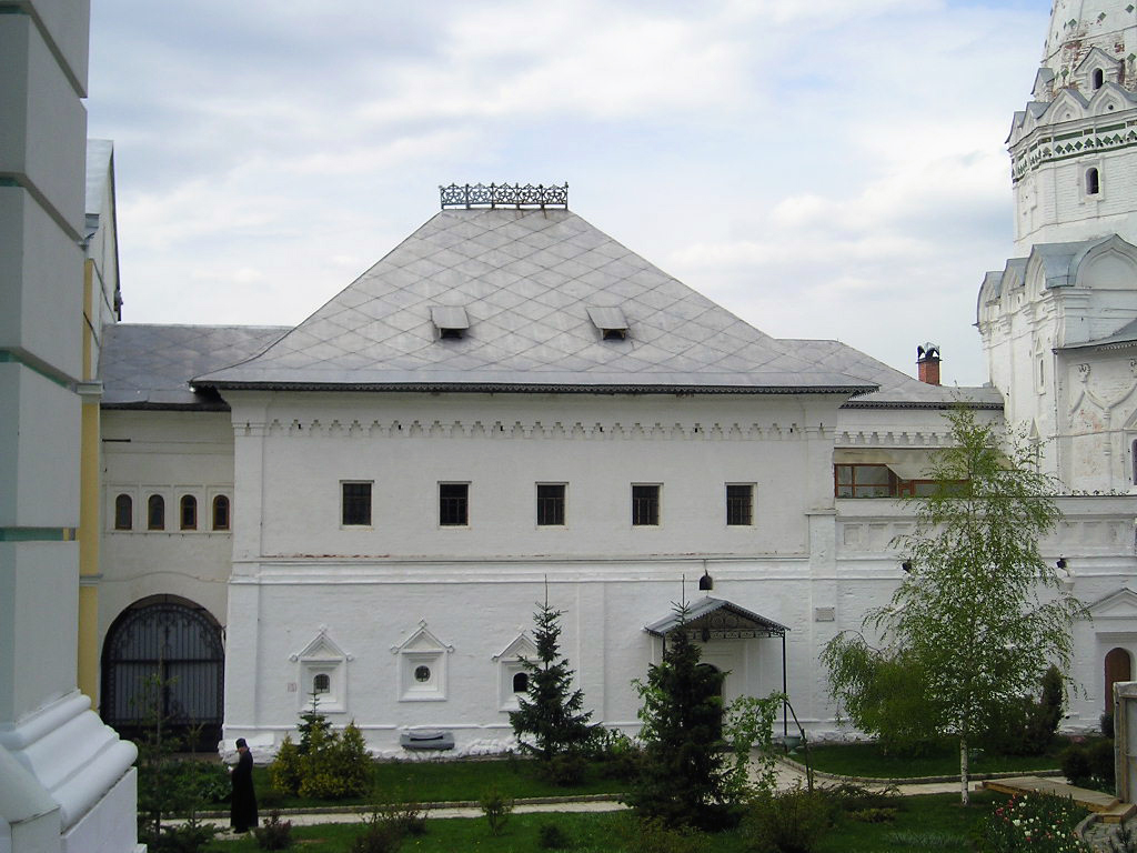 Больничные палаты Троице-Сергиевой лавры Hospital chamber at the Trinity Lavra (1630s)